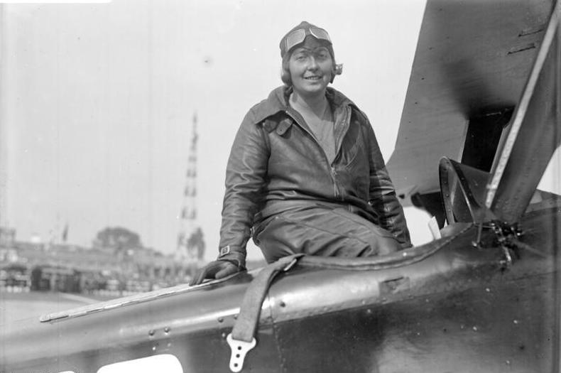 Die bekannte deutsche Kunstfliegerin Thea Rasche verunglückte beim Start auf dem Centralflughafen in Berlin-Tempelhof. Die Maschine wurde zertrümmert, sie selbst kam mit leichten Verletzungen davon.